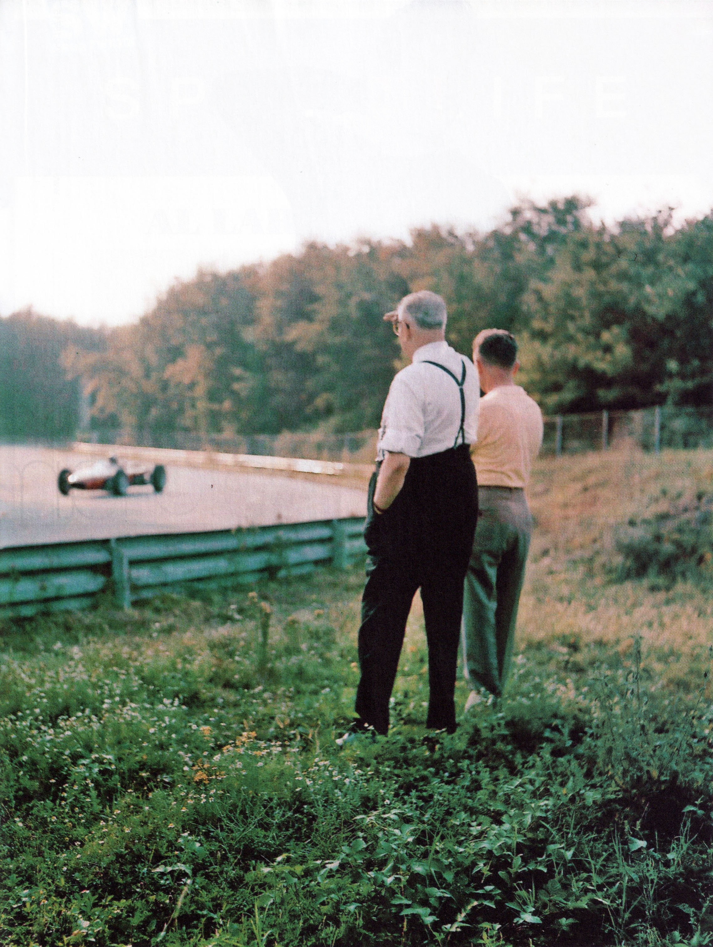 Monza, Autodromo Nazionale, 1962. Enzo Ferrari, fondatore della Scuderia Ferrari, lungo il circuito mentre osserva una sua monoposto in fase di test.